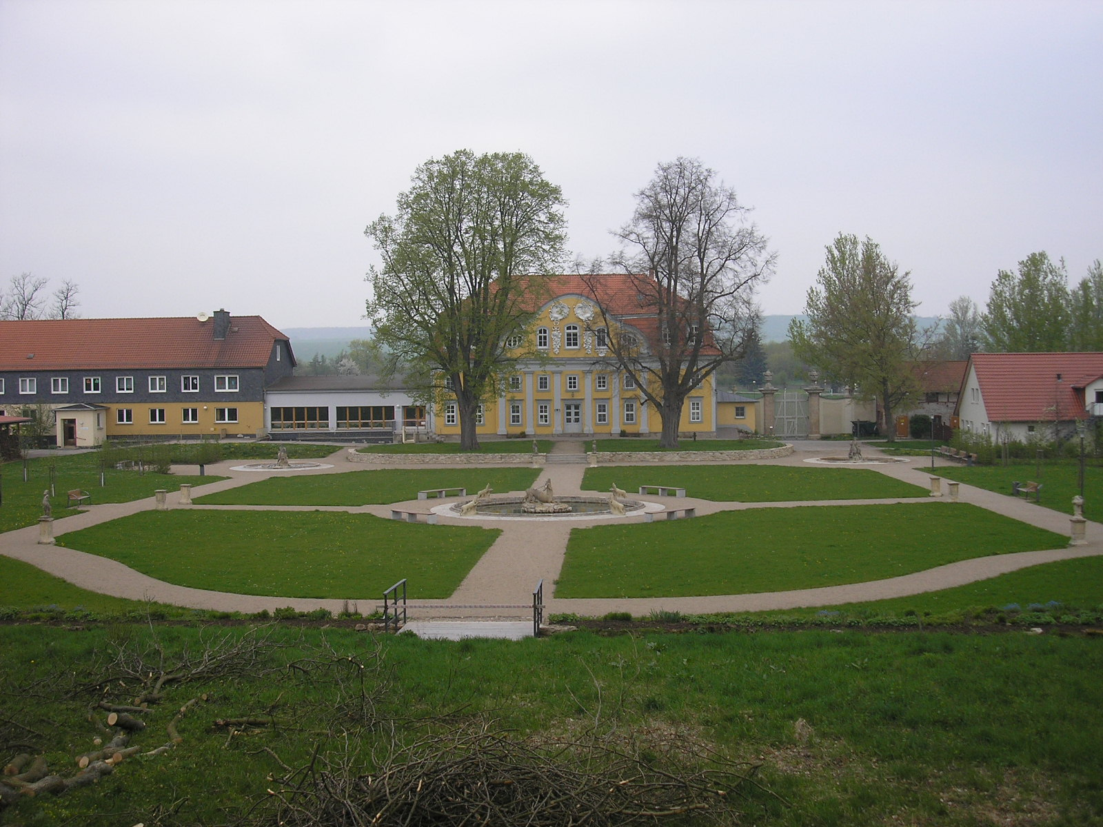 Blick über den unteren Teil des Schlossparks in Ebeleben (Thüringen).